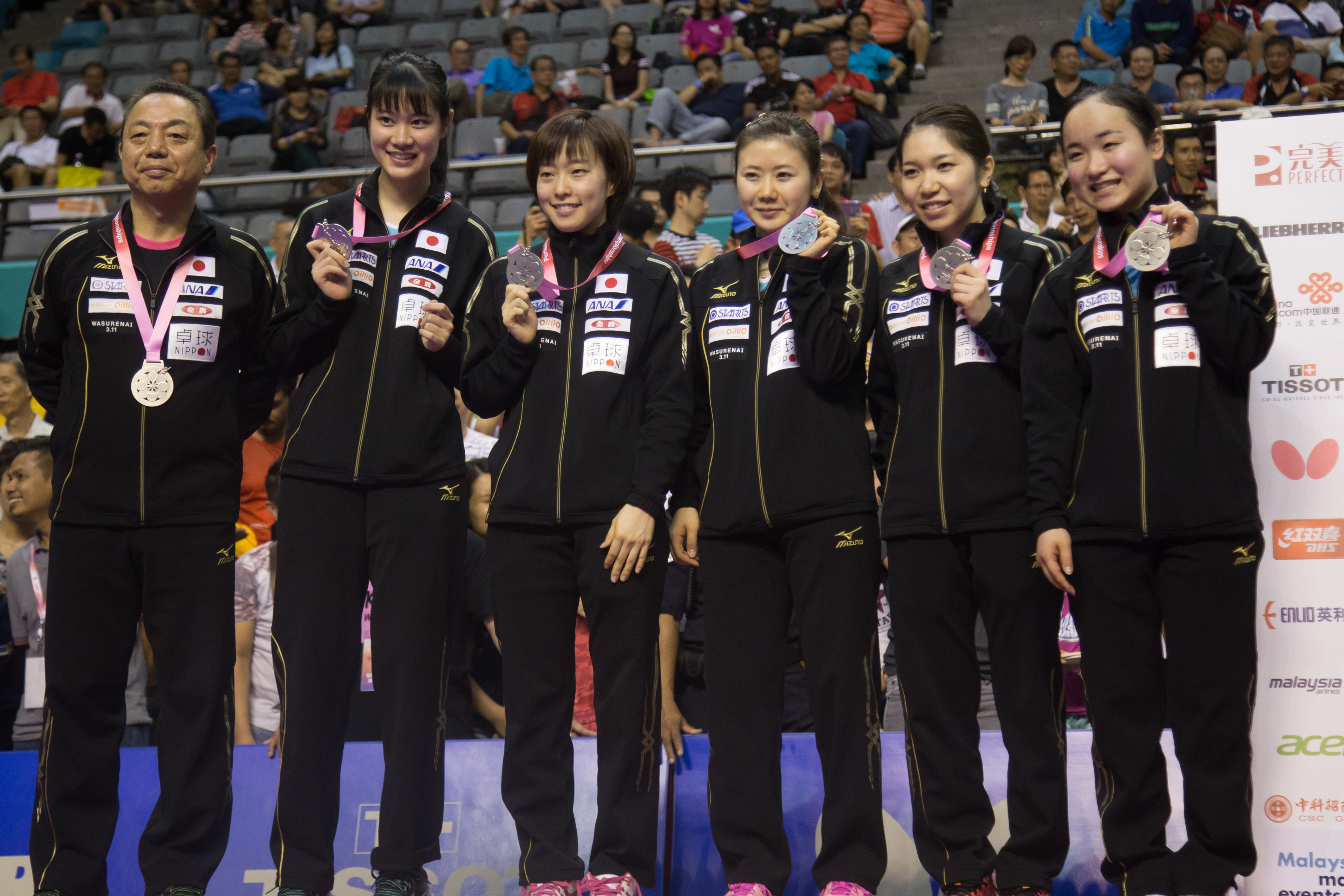 _K0K6828